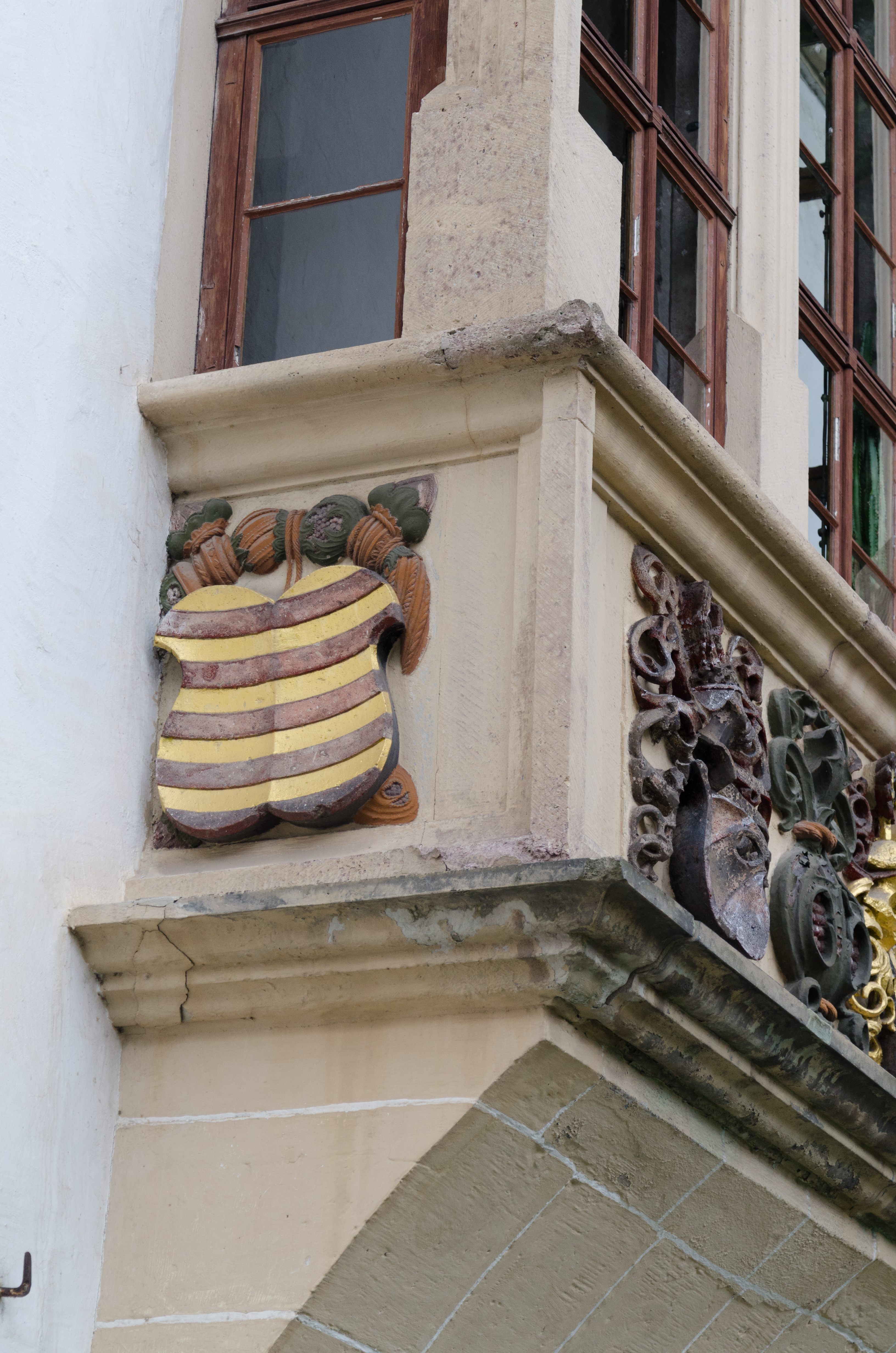 Glauchau, Schloß